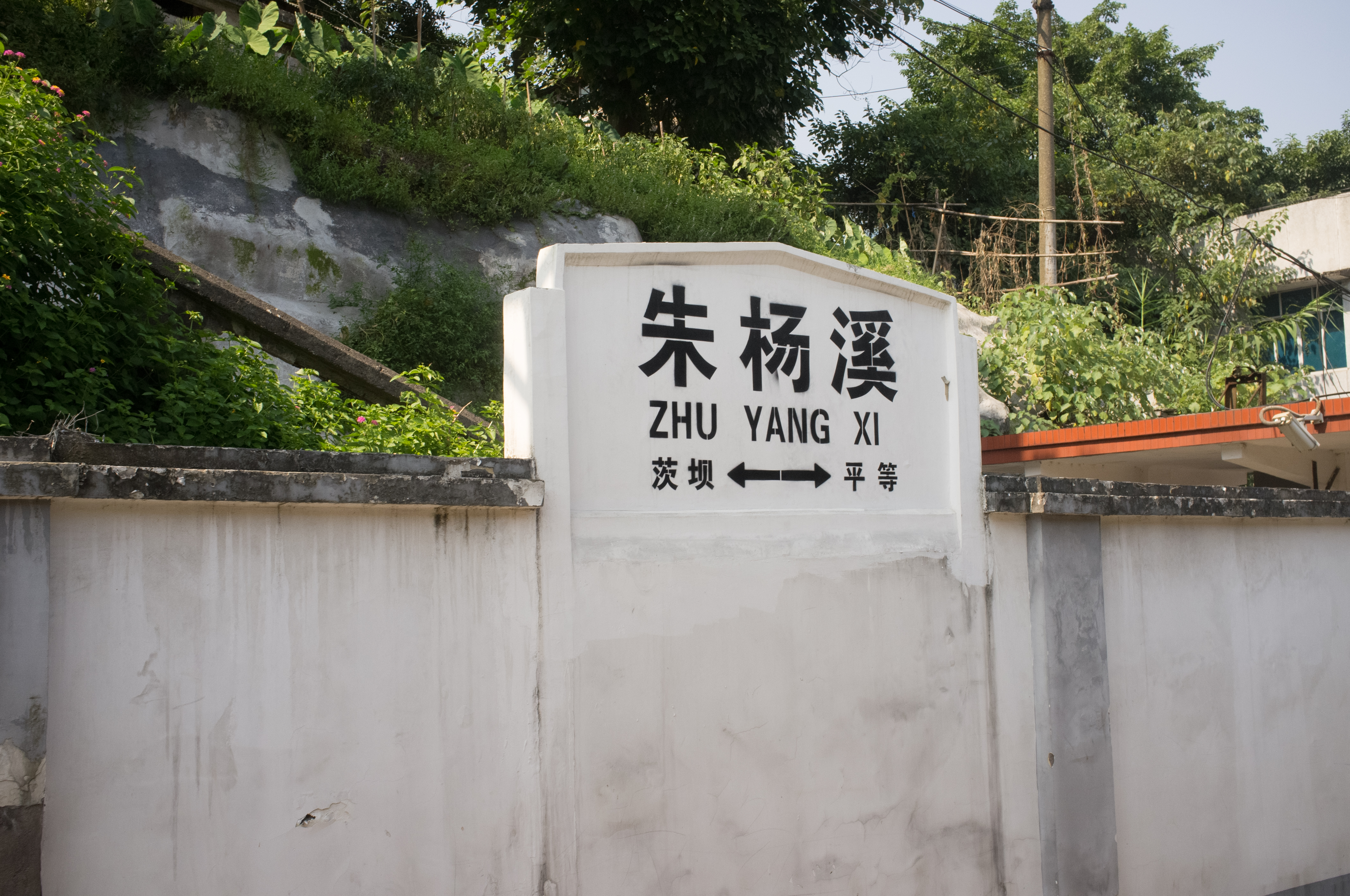 中文（中国大陆）: 成渝铁路朱杨溪站